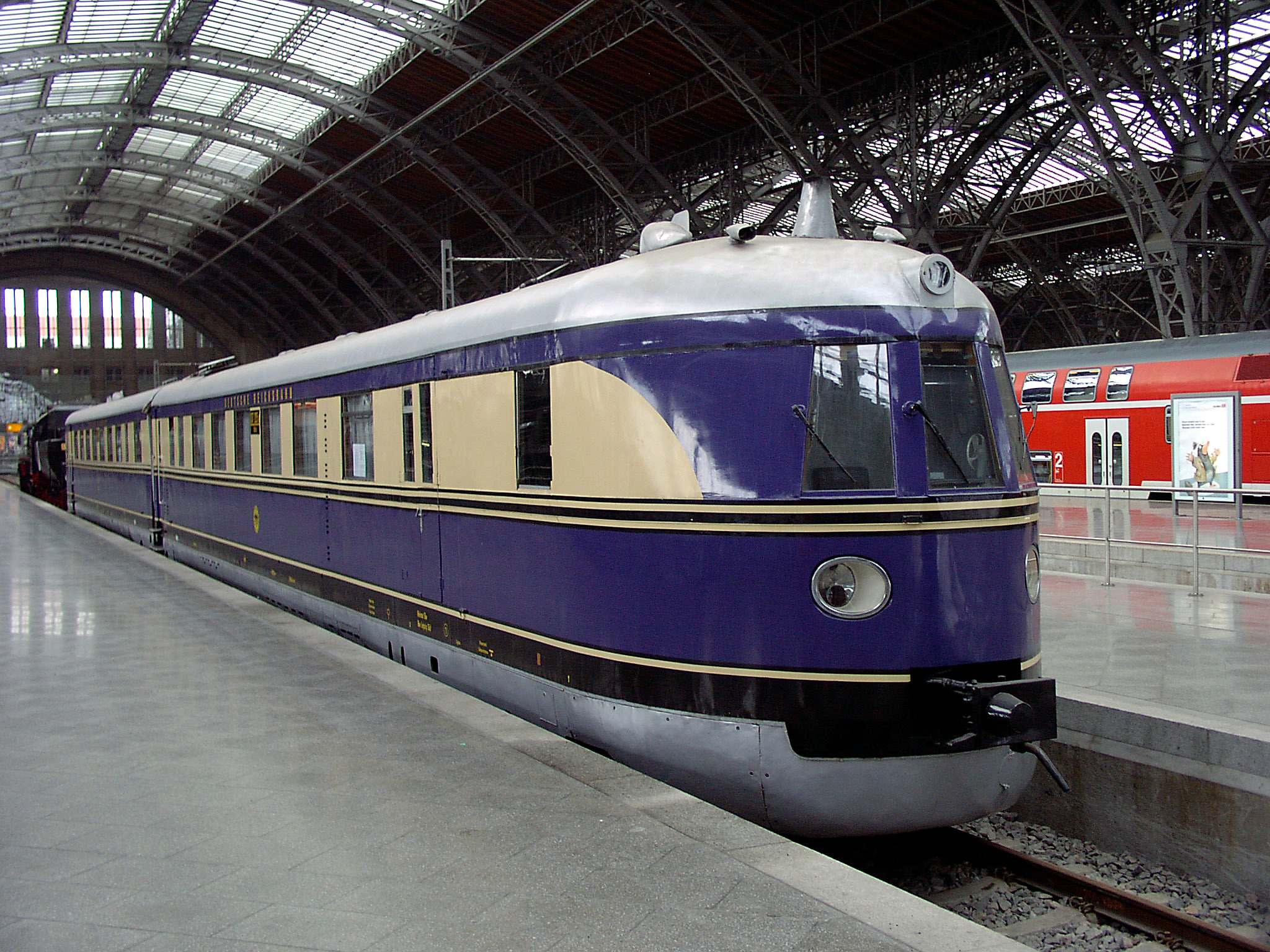 SVT 137 Bauart Hamburg im Leipziger Hauptbahnhof